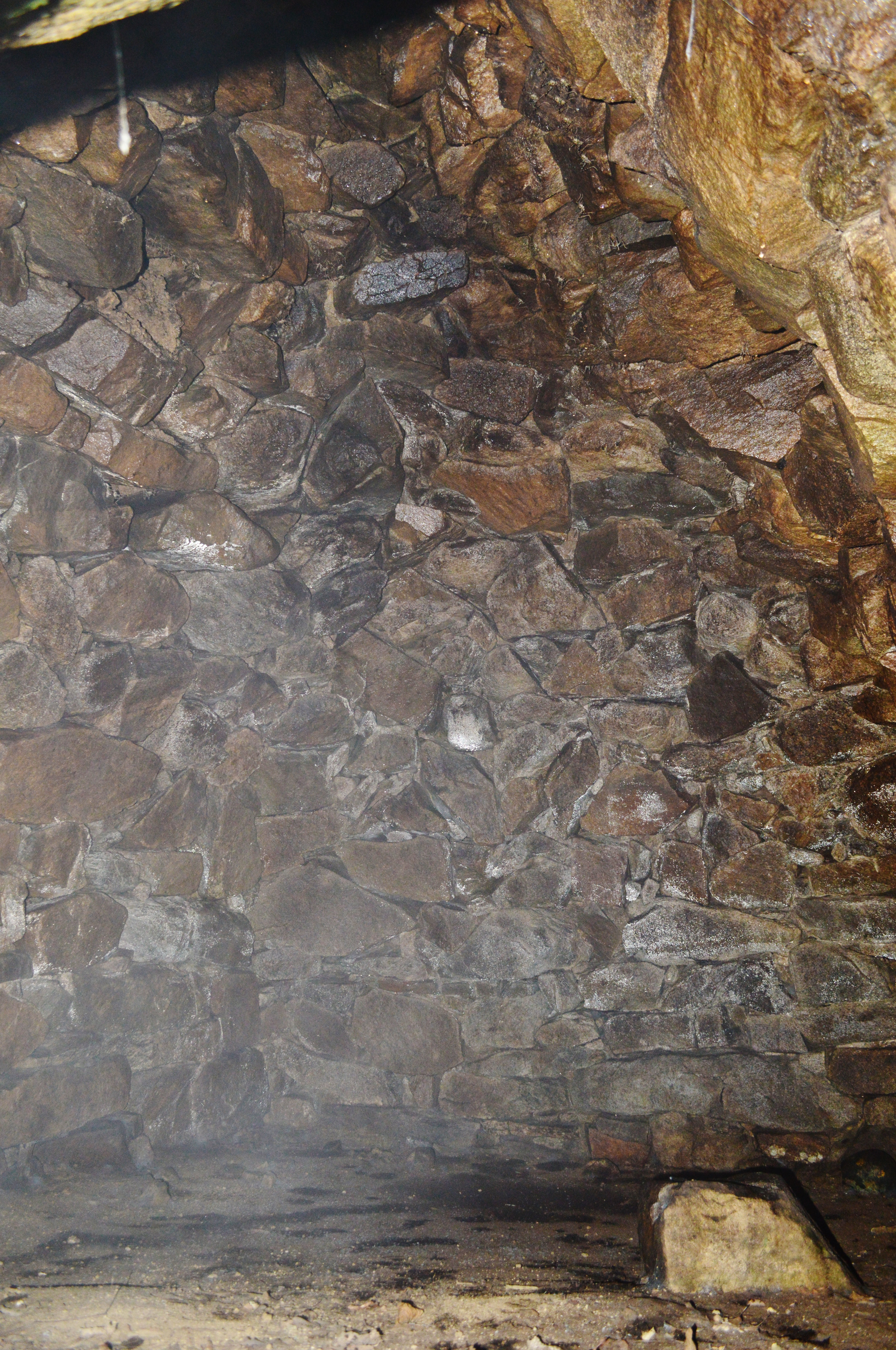 宮山塚古墳 玄室